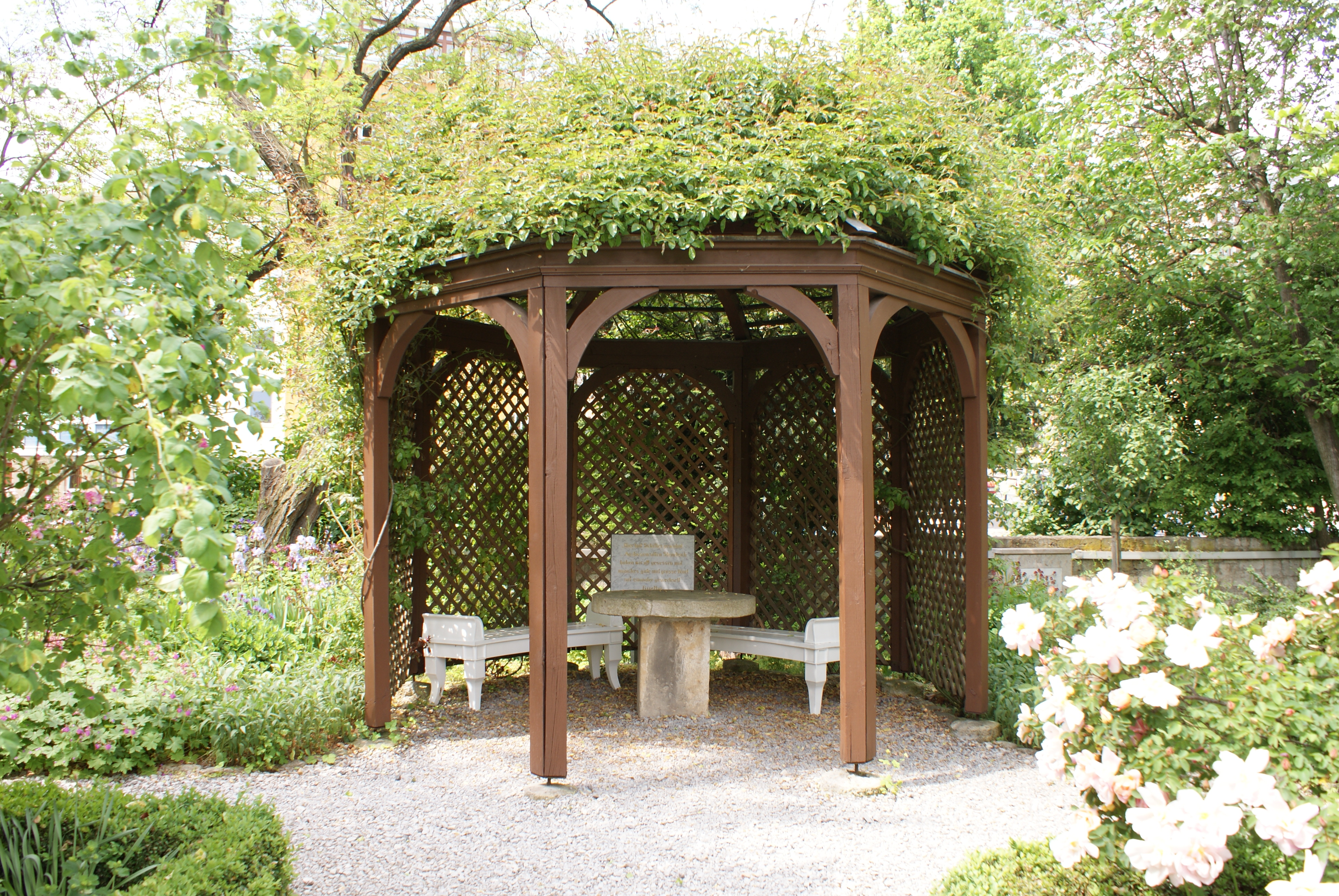 Die Veranda (sowie der Steintisch) im Garten von Schillers Gartenhaus